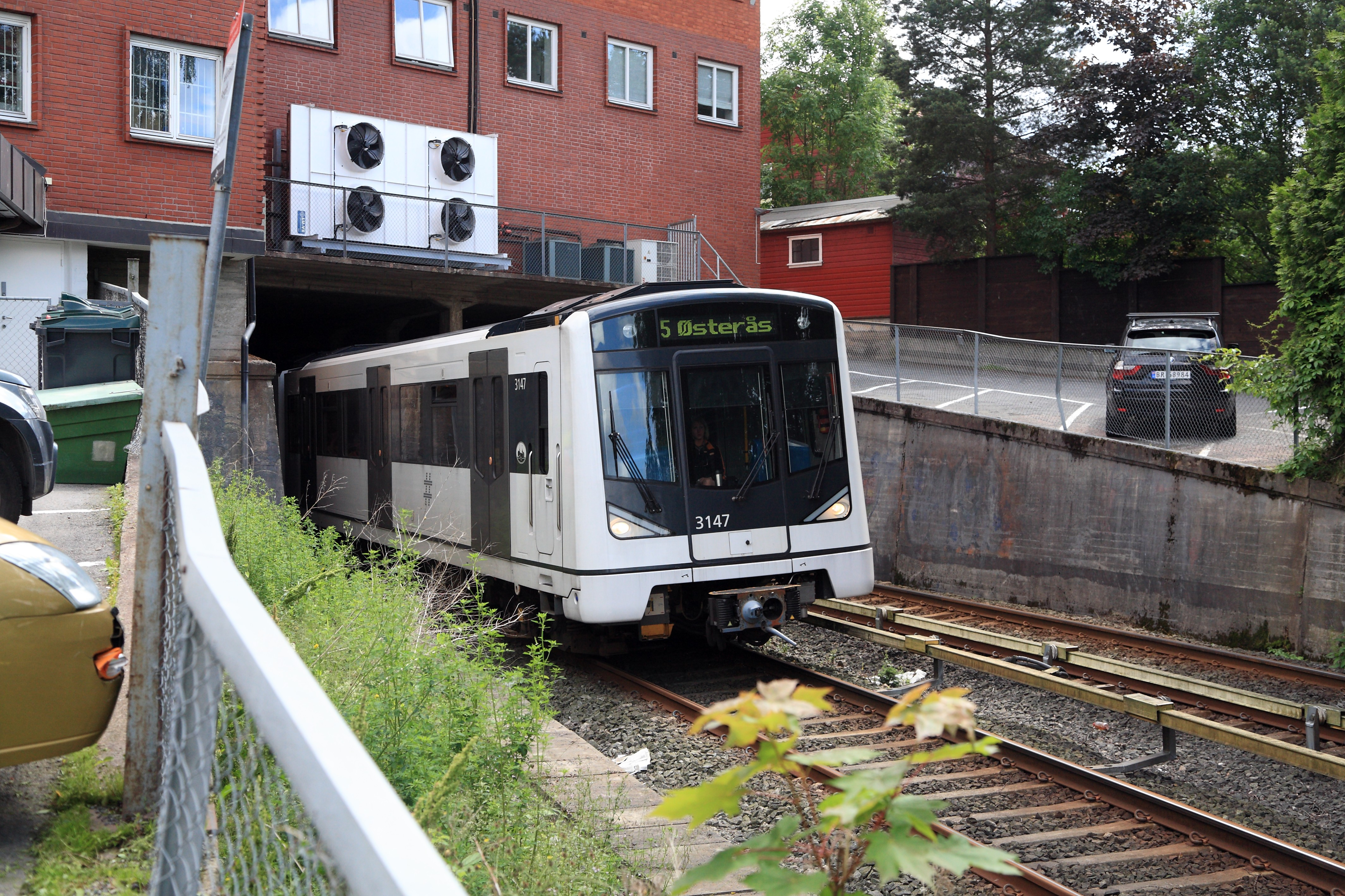 Zug der Linie 5 nach Østerås bei der Abfahrt von Røa.